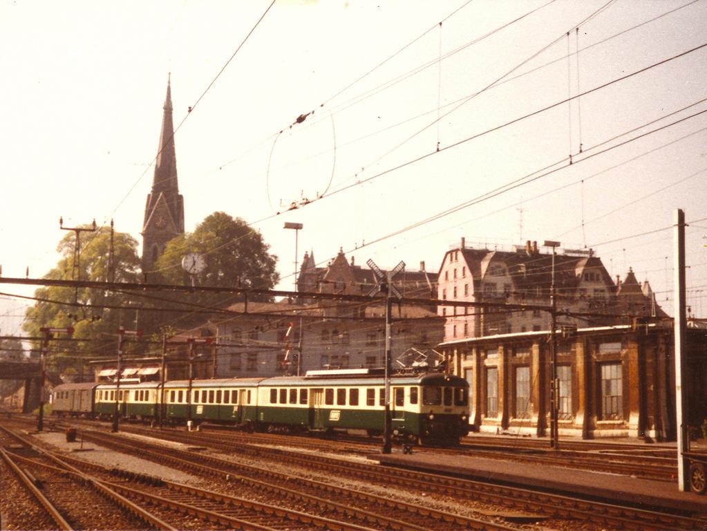 BT-Pendelzug BDe 2/4 41 + AB 253 + BDe 2/4 42 und Postwagen in St. Gallen